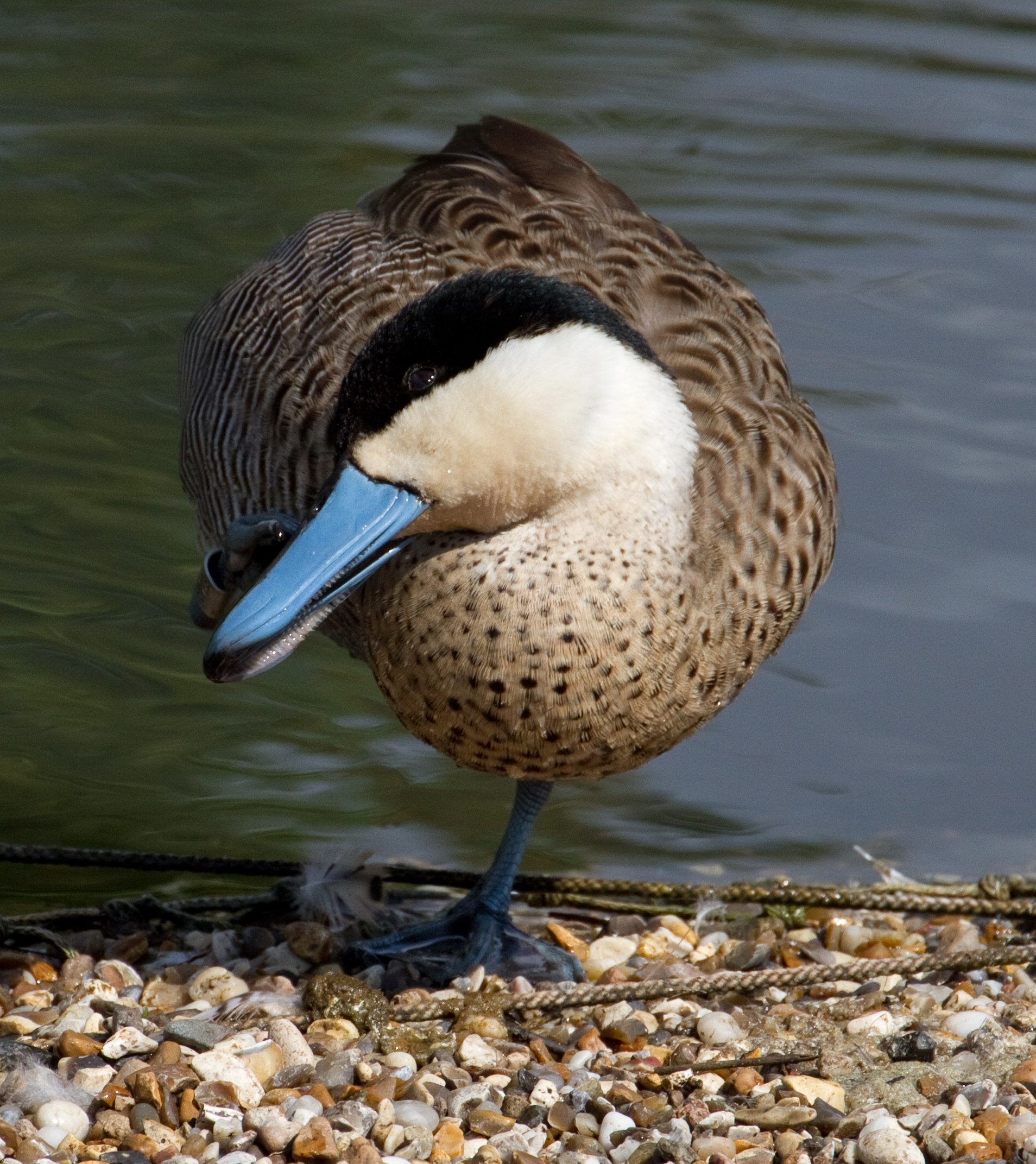 Puna Teal 2